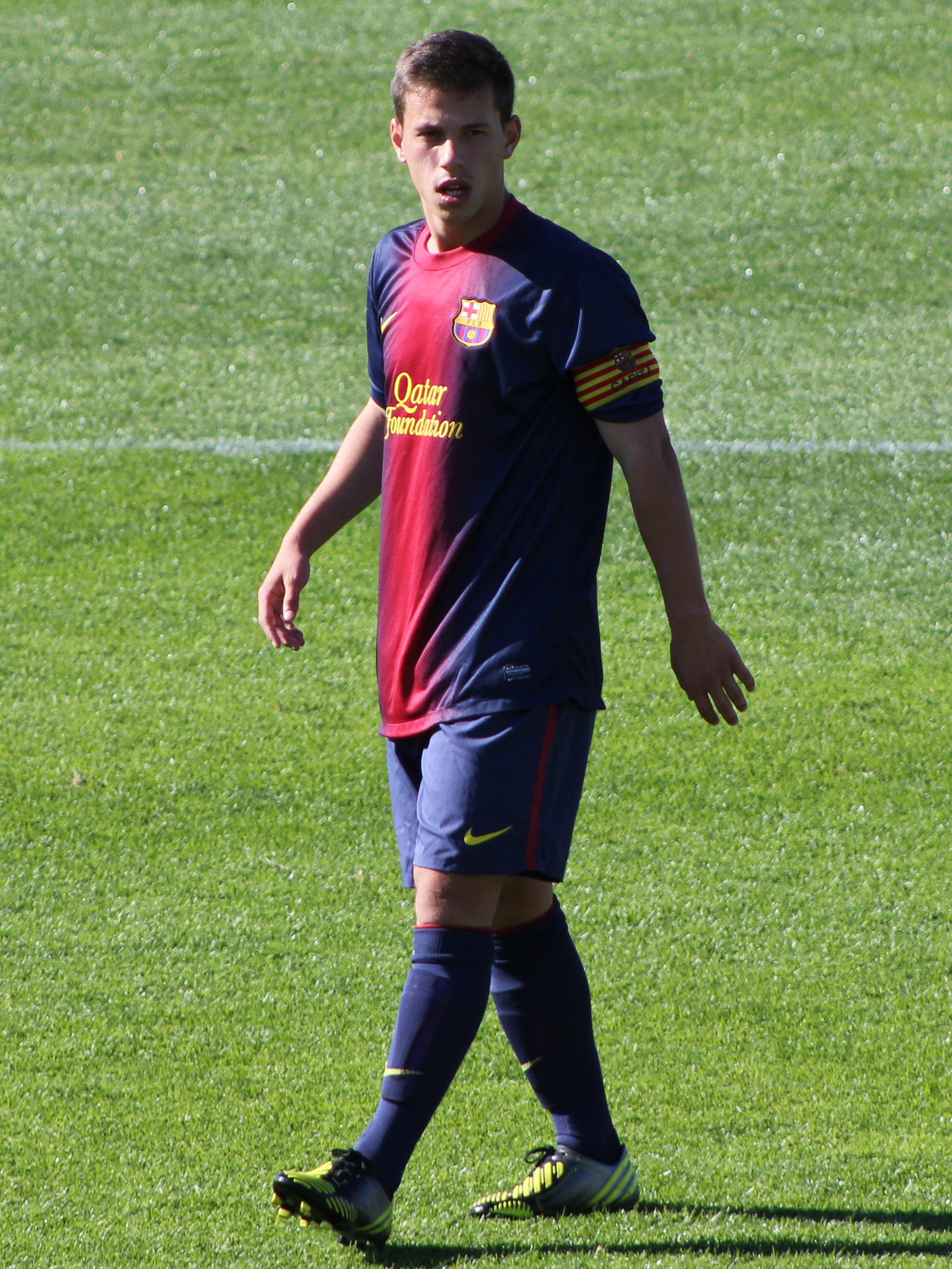 Foto realizada por Javier Segura (@castroquini)